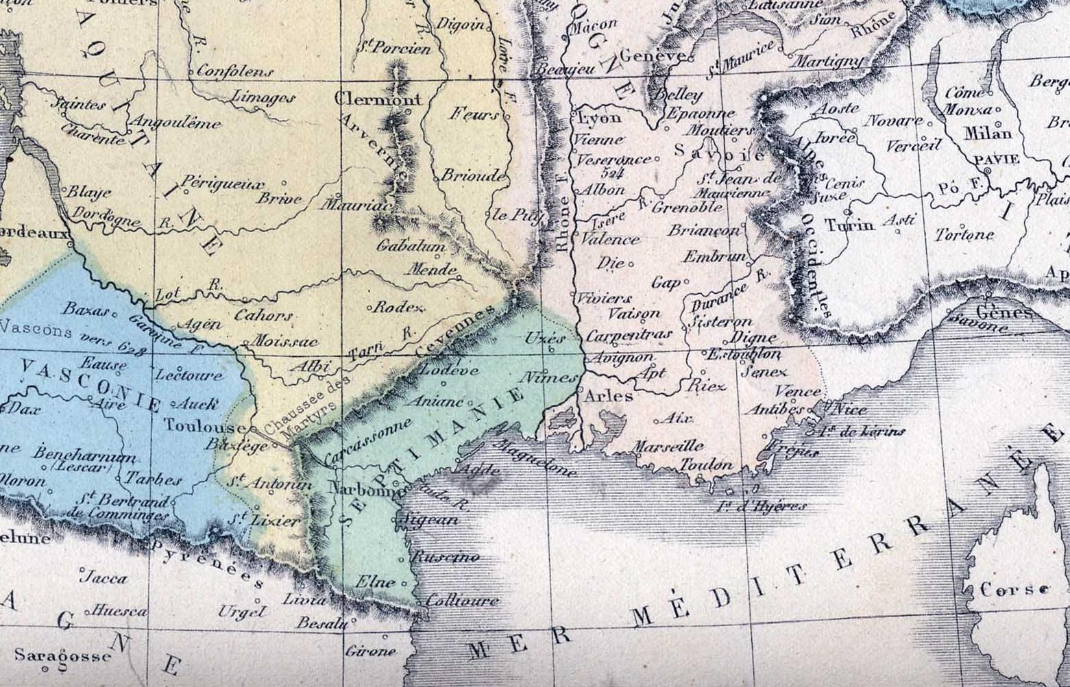 Carte de la Septimanie en 752